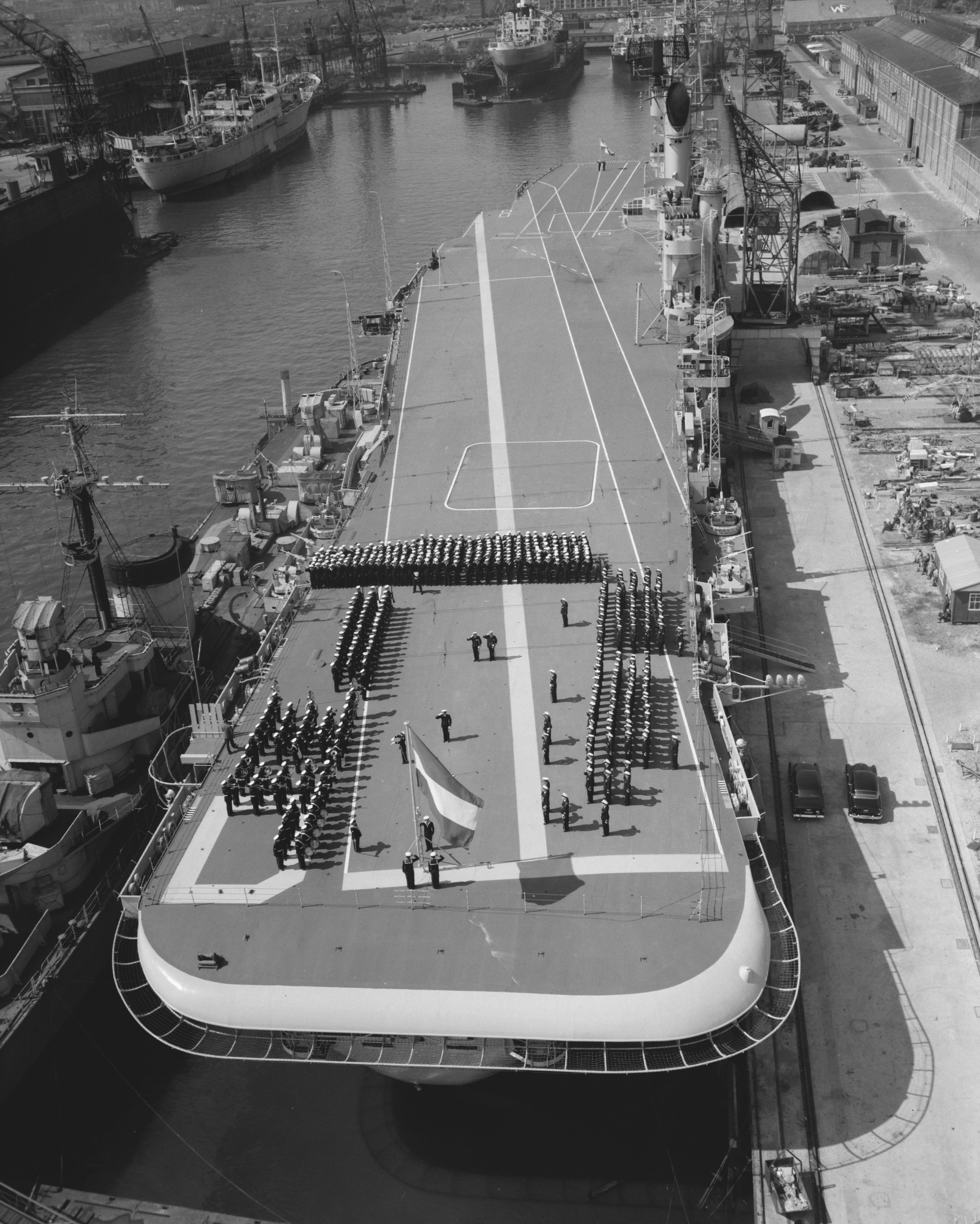 Wederindienststelling van de Karel Doorman te Schiedam